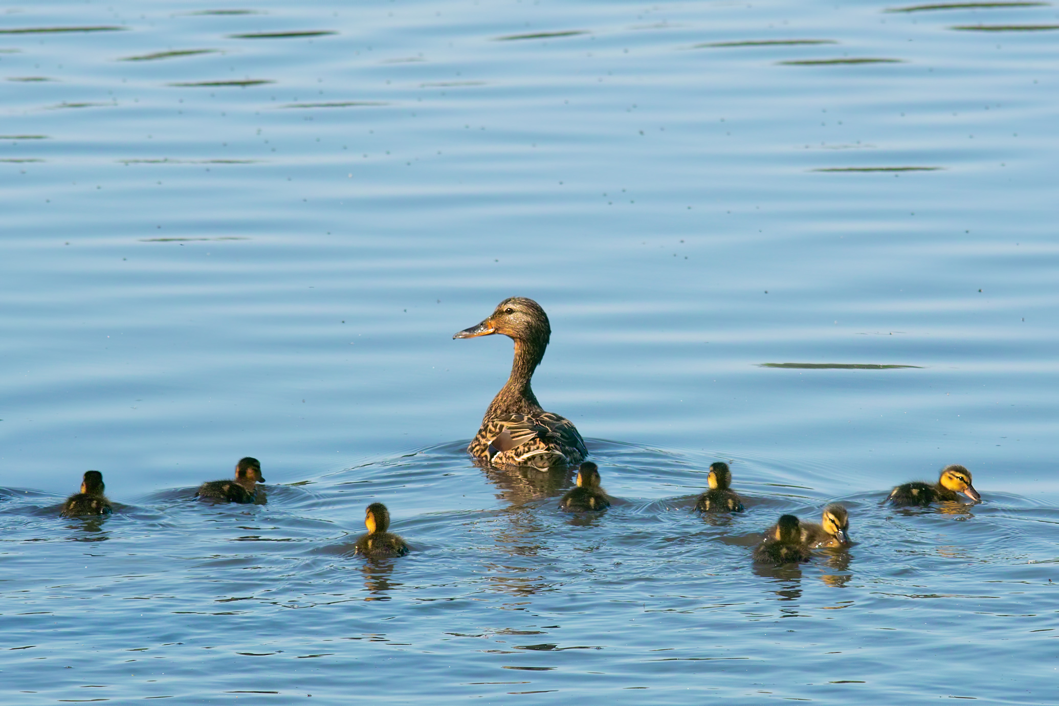 Vrbenské rybníky, Domin, kachna divoká, mláďata